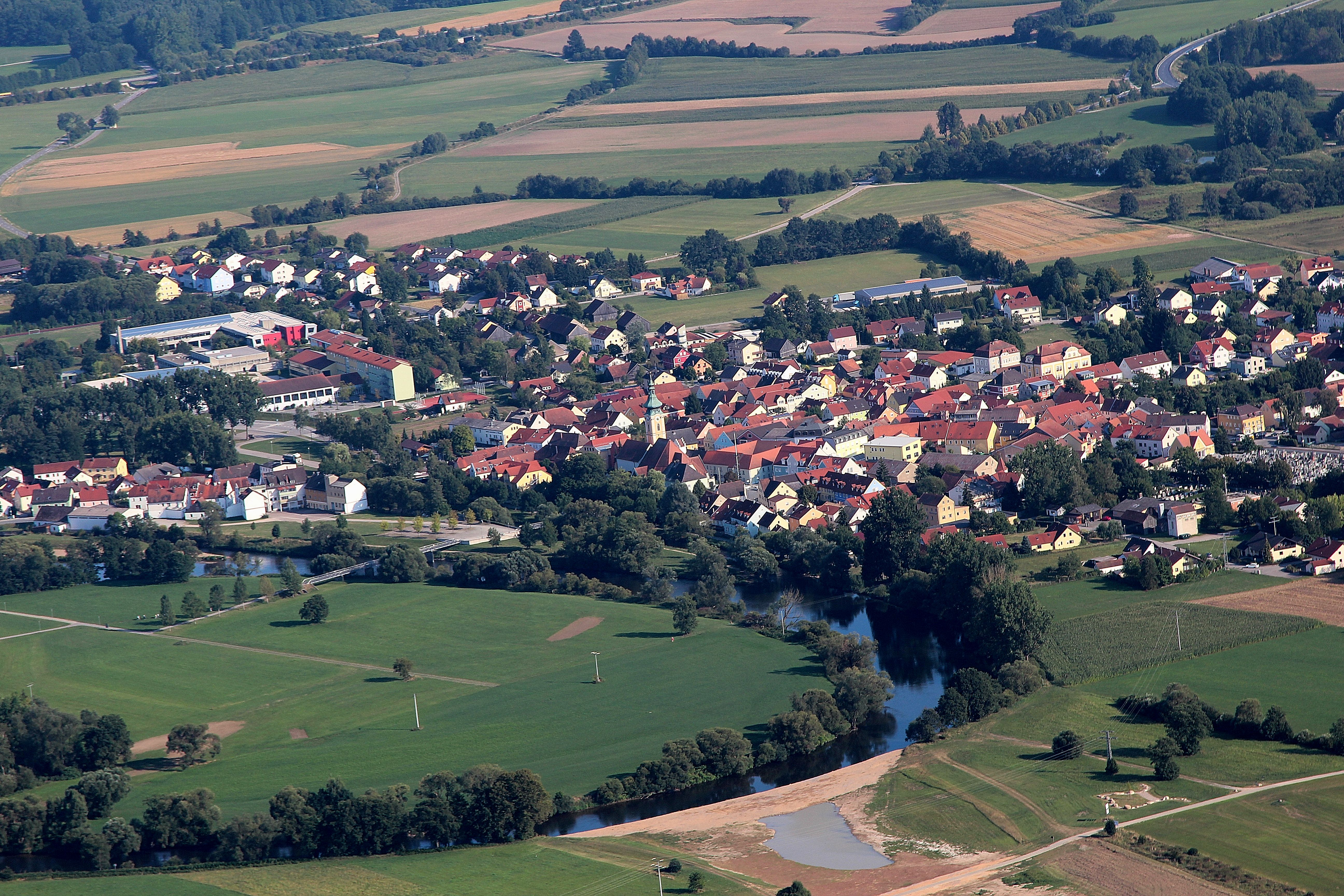 Nittenau, Landkreis Schwandorf, Oberpfalz, Bayern